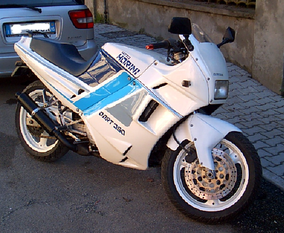 Vista della Moto Morini DART 350 (1989) Foto scattata da me alla mia moto.